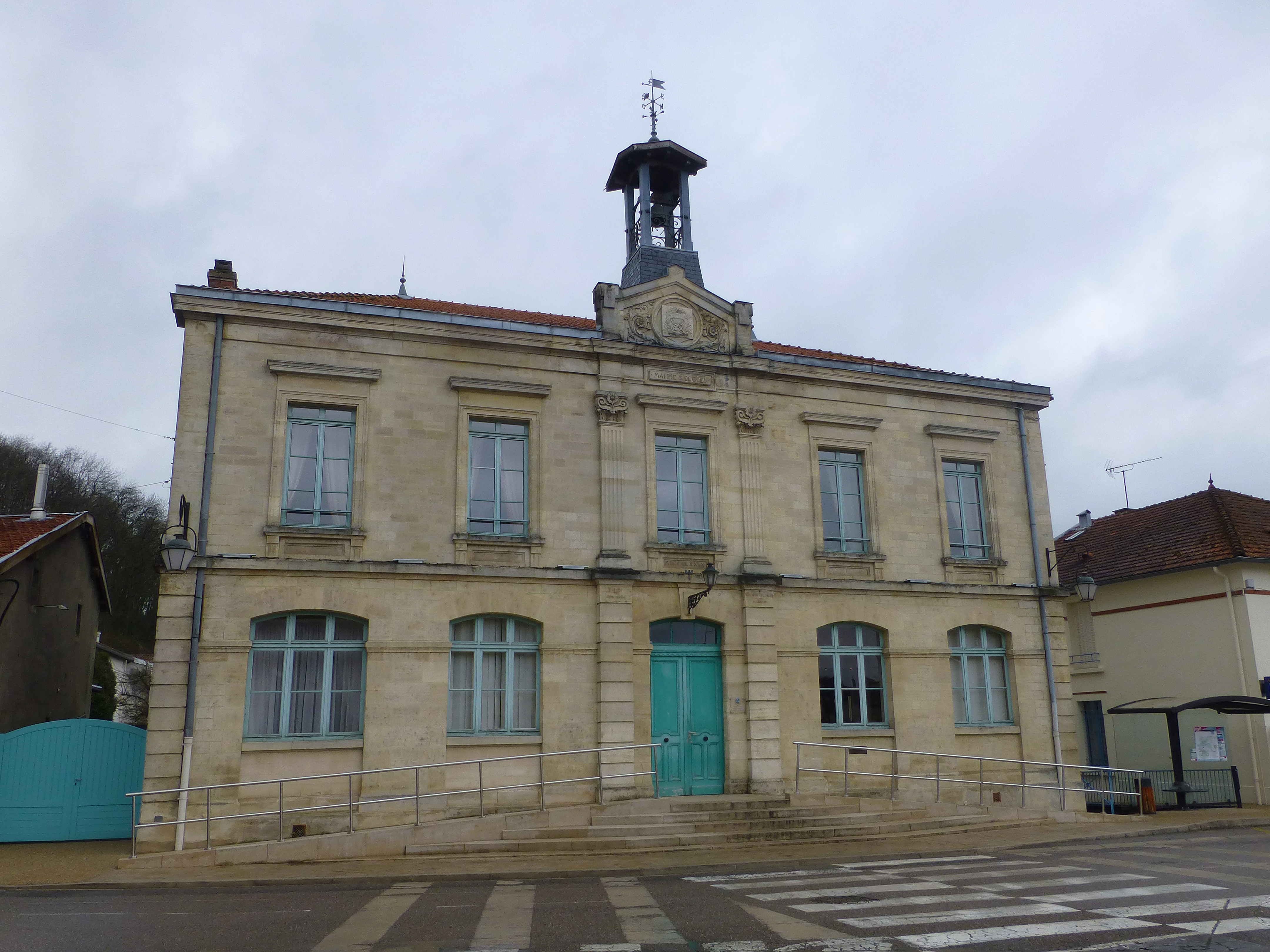 Mairie-école à Fains-les-Sources (Fains-Véel, Meuse)